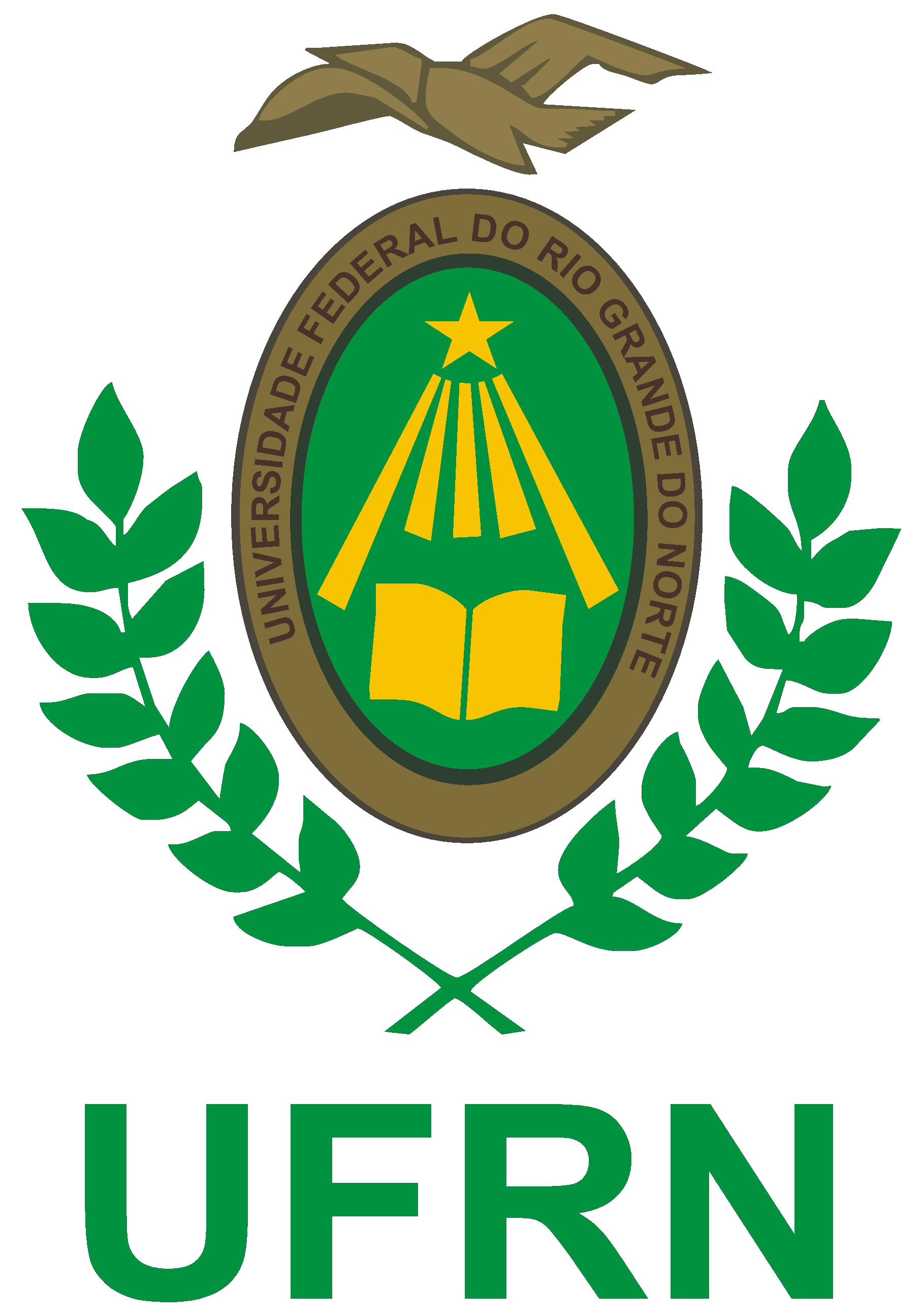 Brasão Oficial da Universidade Federal do Rio Grande do Norte (UFRN)